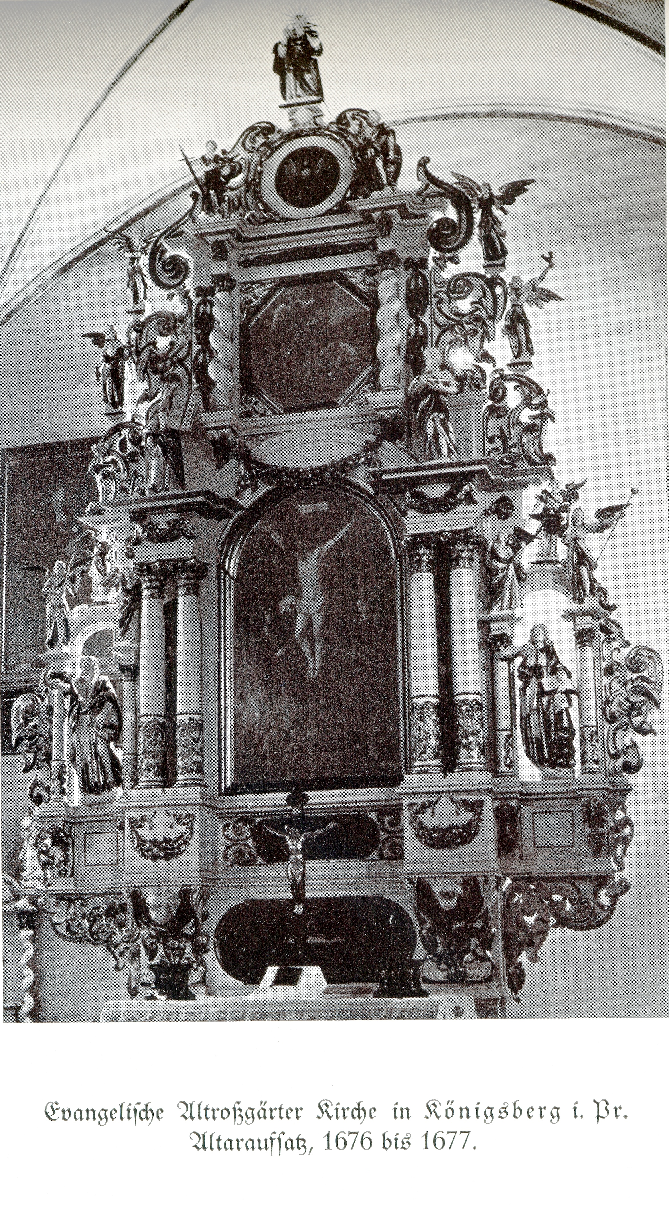 Königsberg, Altroßgärter Kirche, Altaraufsatz, 1676 bis 1677